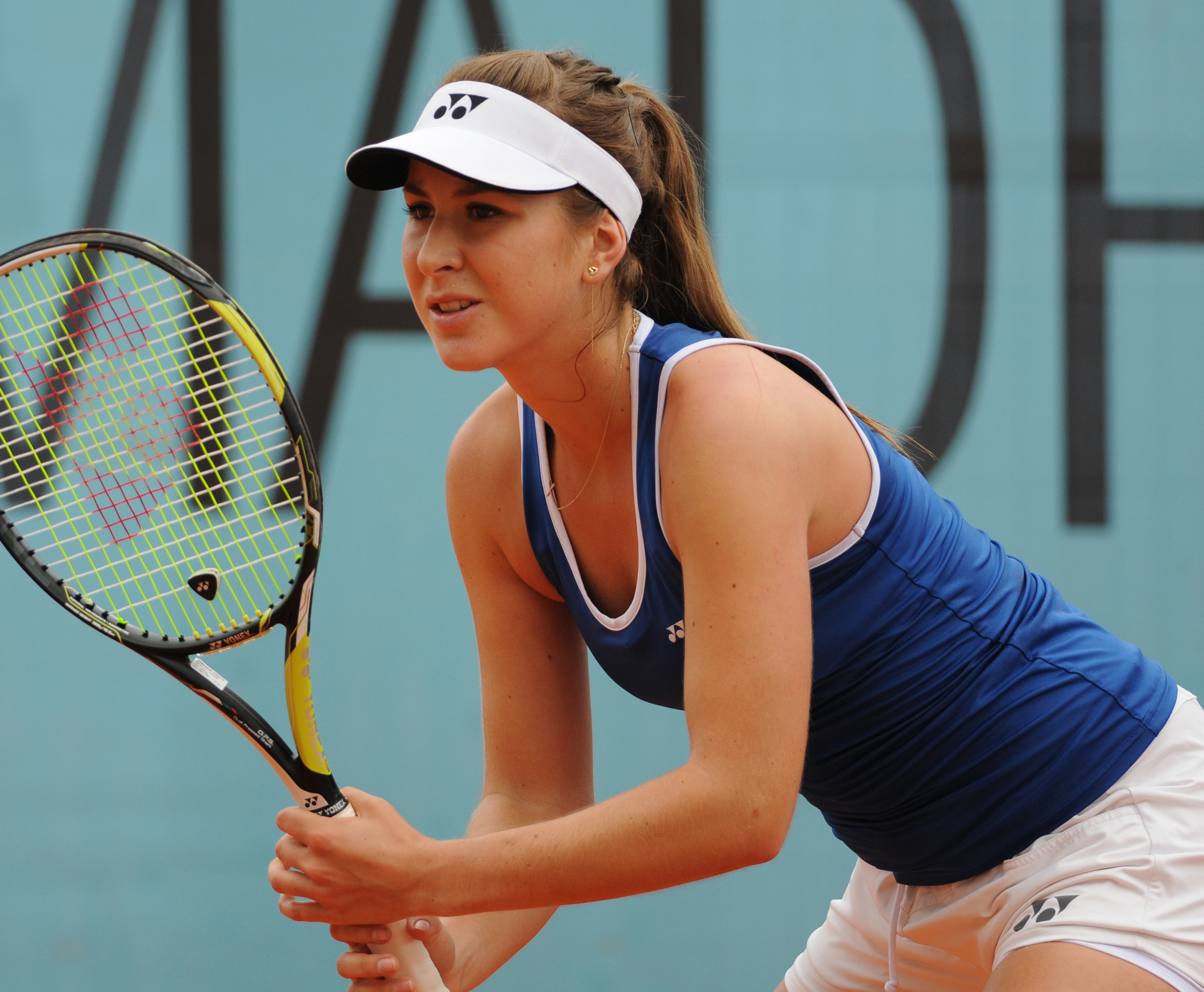 Belinda Bencic